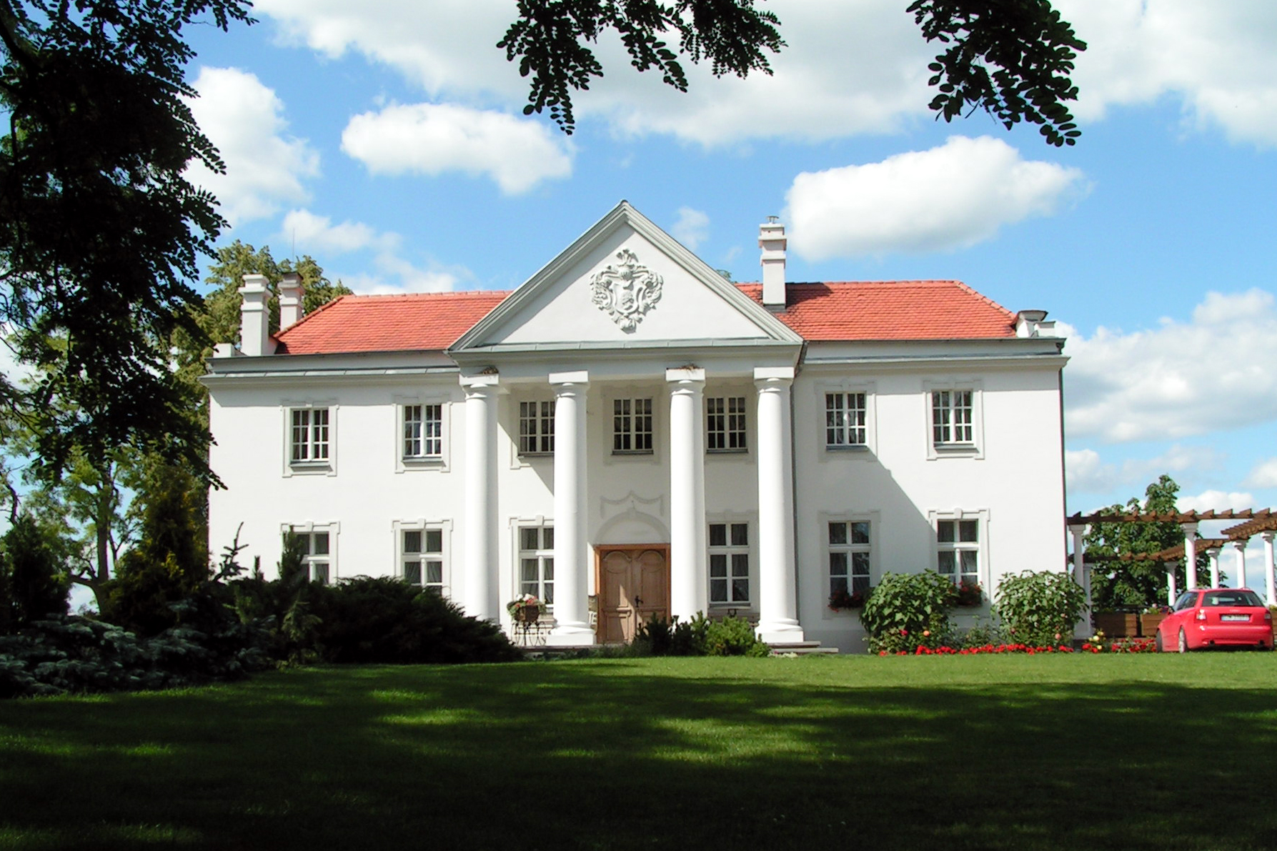 Grochowiska Szlacheckie - dwór, ok. 1780